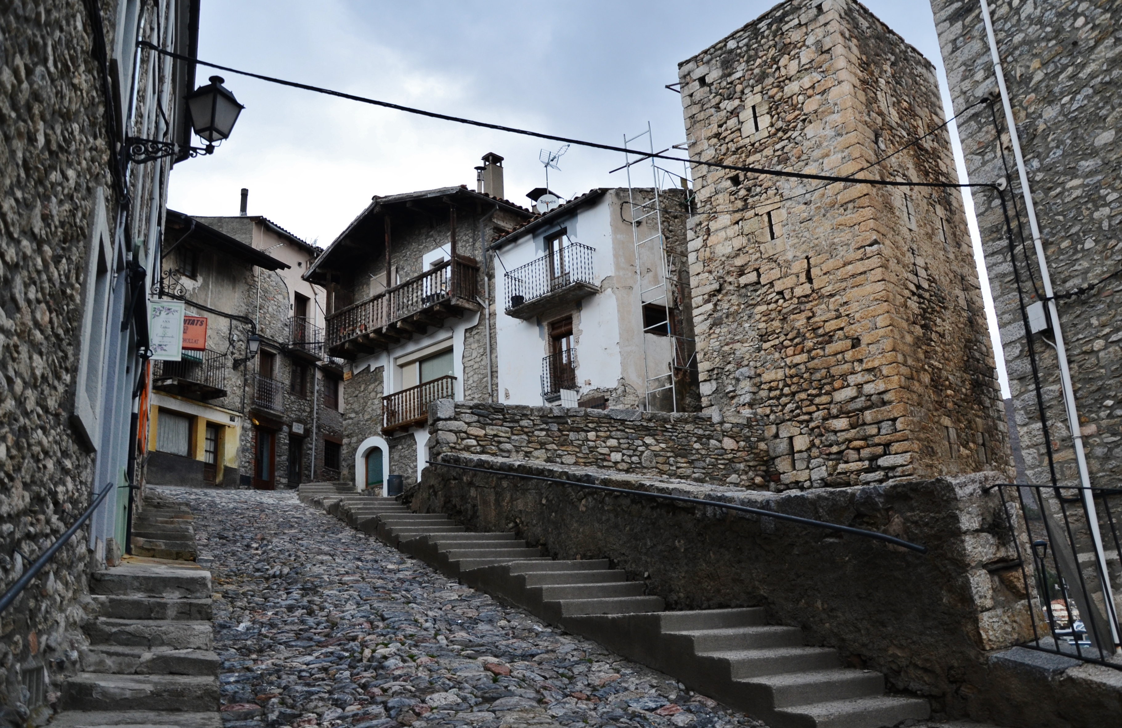 Torre la Presó (Bellver de Cerdanya)